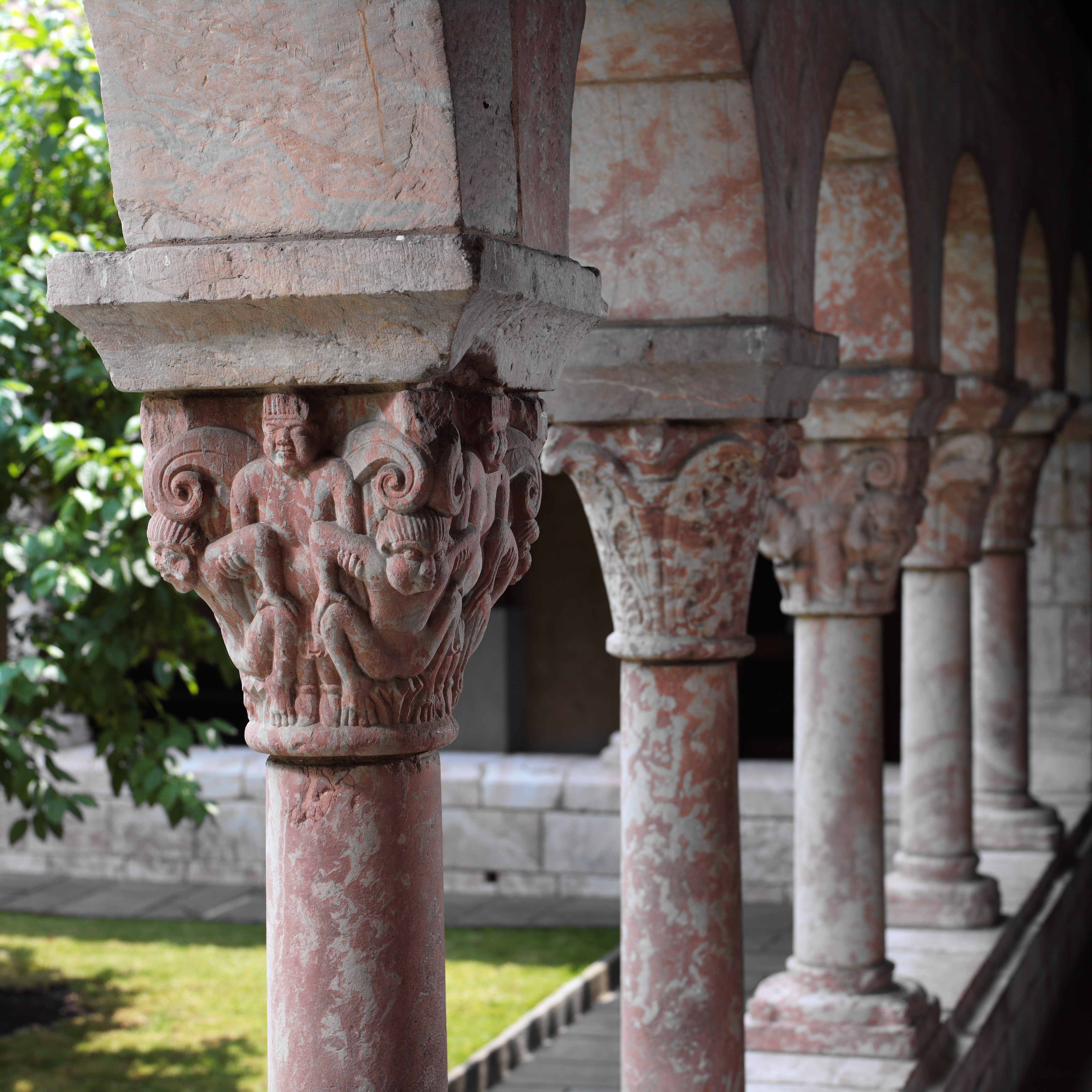 Catalan; Cloister; Sculpture-Architectural-Stone